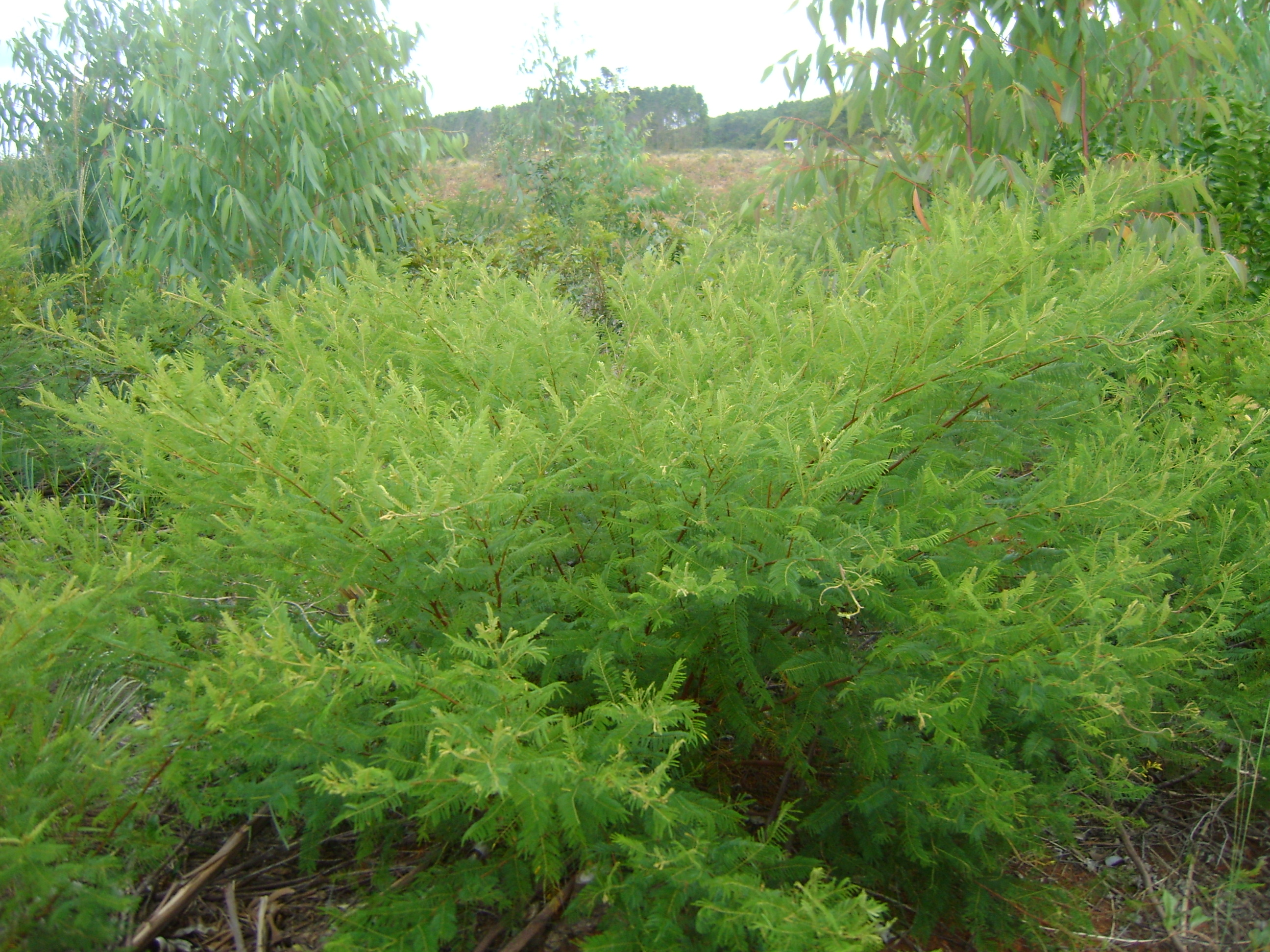 Indivíduo adulto, na forma arbustiva, de Angiquinho ou Carrasquinho.